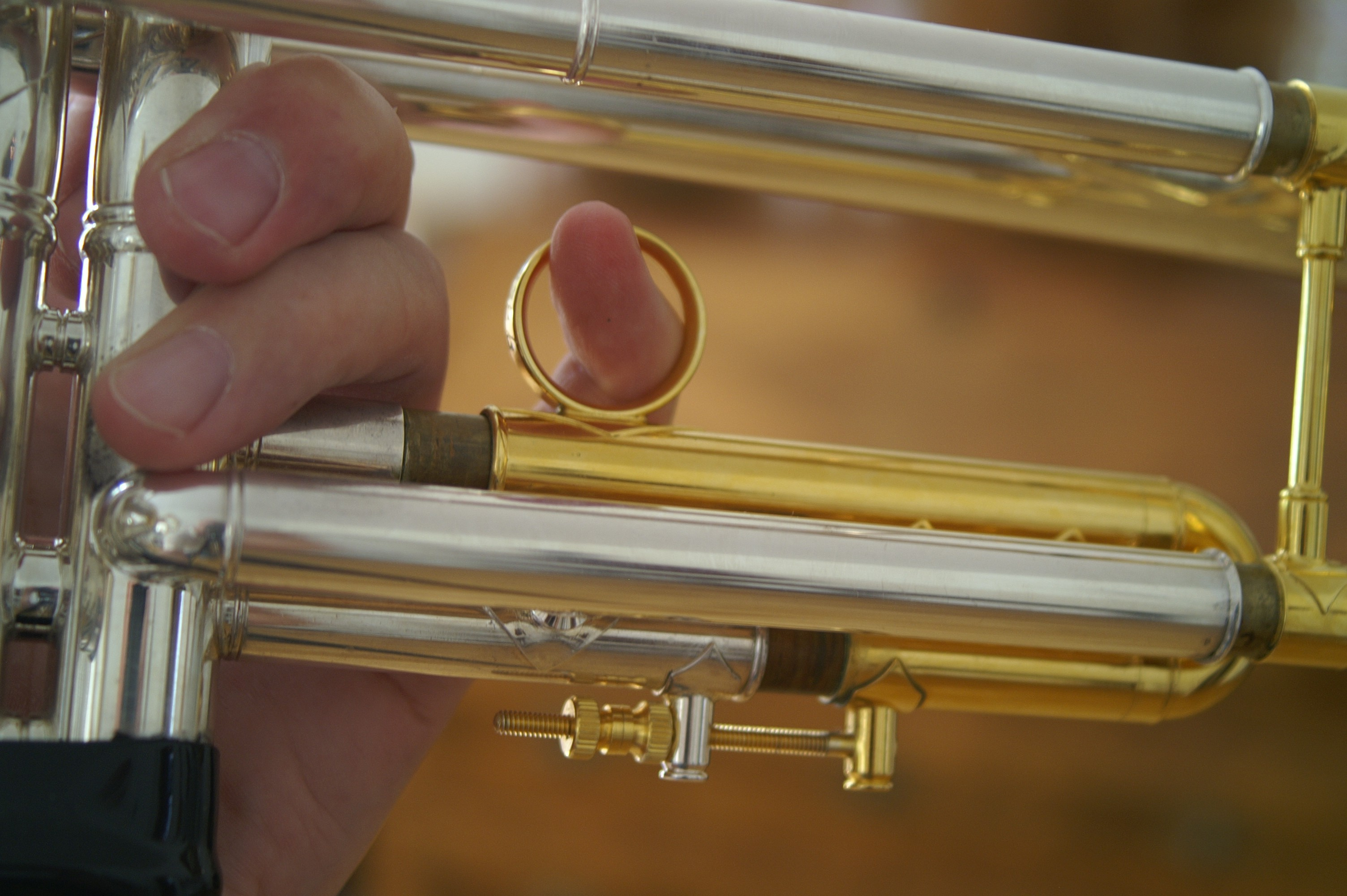 Trigger einer Jazz-Trompete zum Ausgleich der Intonation